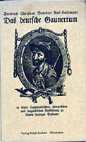 Avé-Lallemant, Friedrich Christian Benedict: Das deutsche Gaunertum in seiner sozialpolitischen, literarischen und linguistischen Ausbildung zu seinem heutigen Bestande.